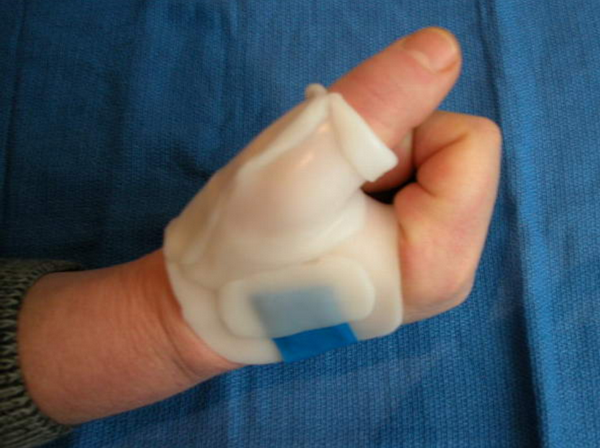 Թերմոպլաստե օրթեզ ռիզարթրոզի դեպքում